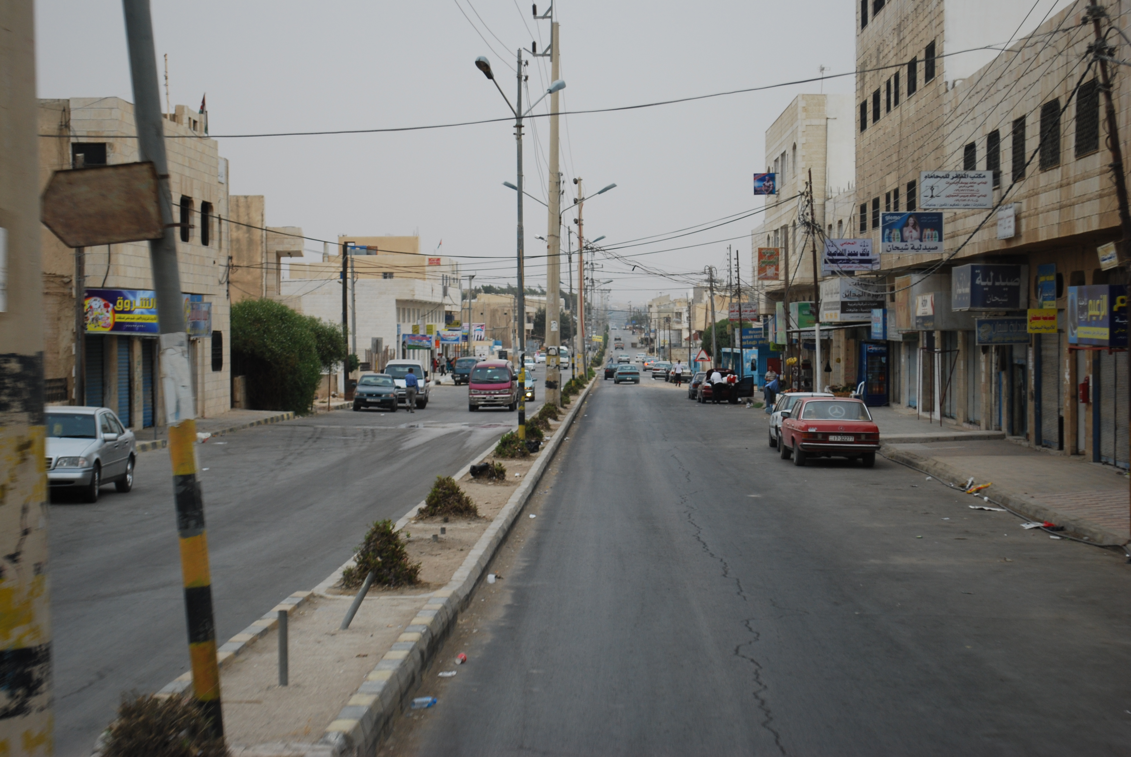 La route n° 35 Amman-Aqaba, entre le Wadi Mujib et Kerak.